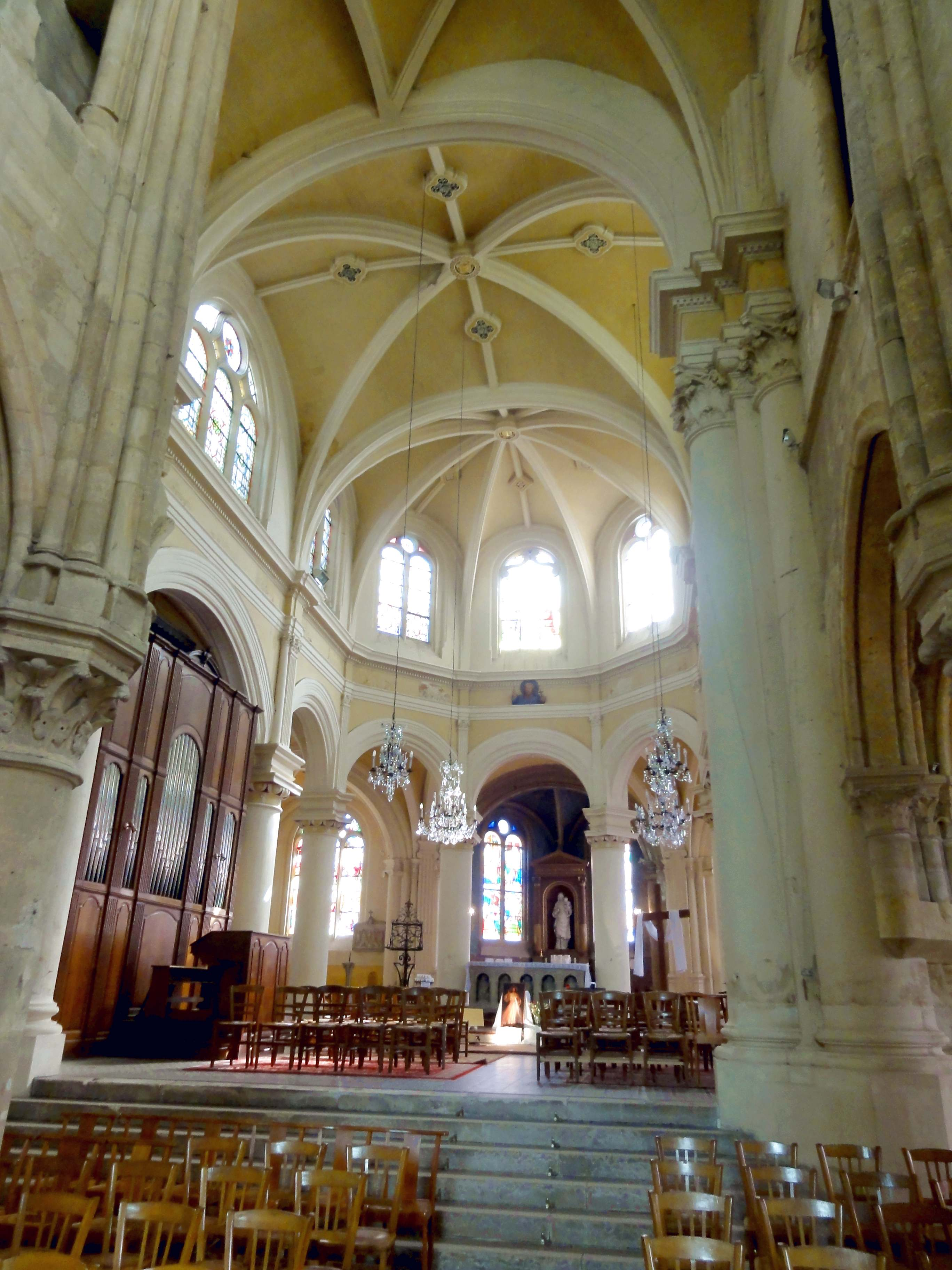 Intérieur de l'église - voir titre.